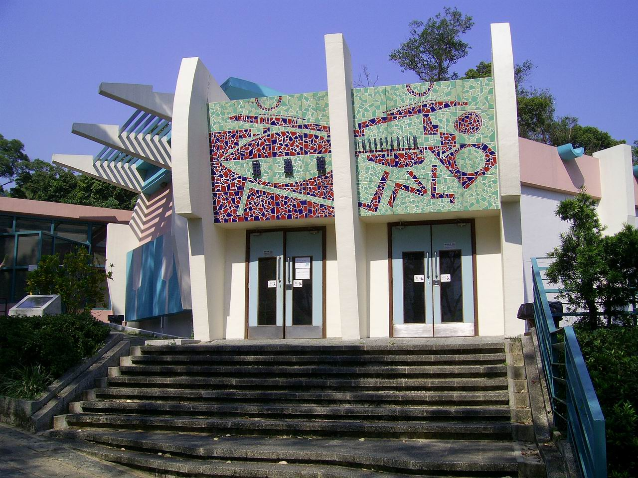 中文（香港）: 獅子會自然教育中心「昆蟲館」